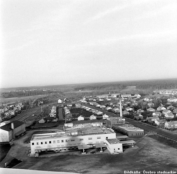 Bostadsområdet Ringstorp i Örebro. Mejeriet i förgrunden.